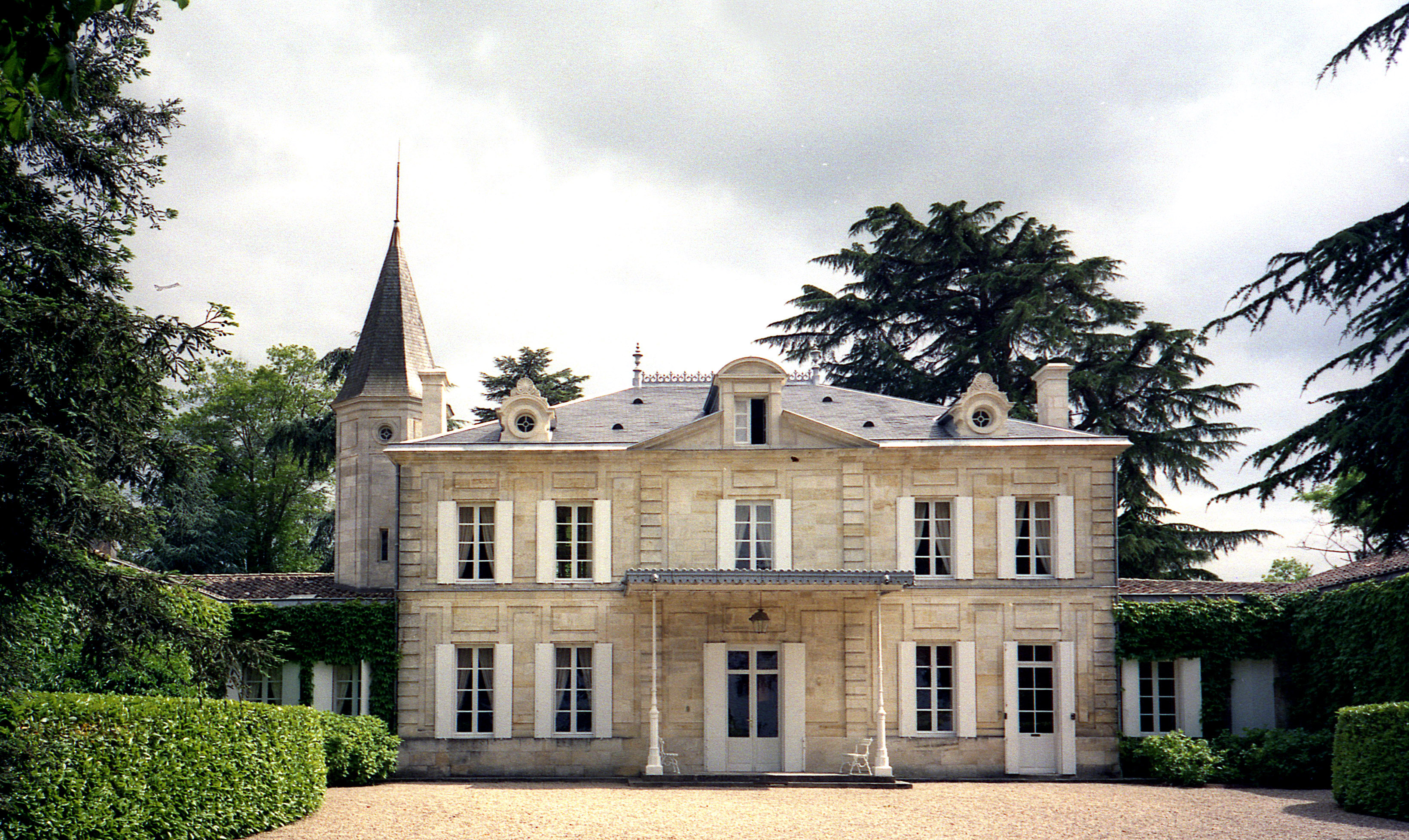 Château Cheval-Blanc - Bordeaux - St. Emilion